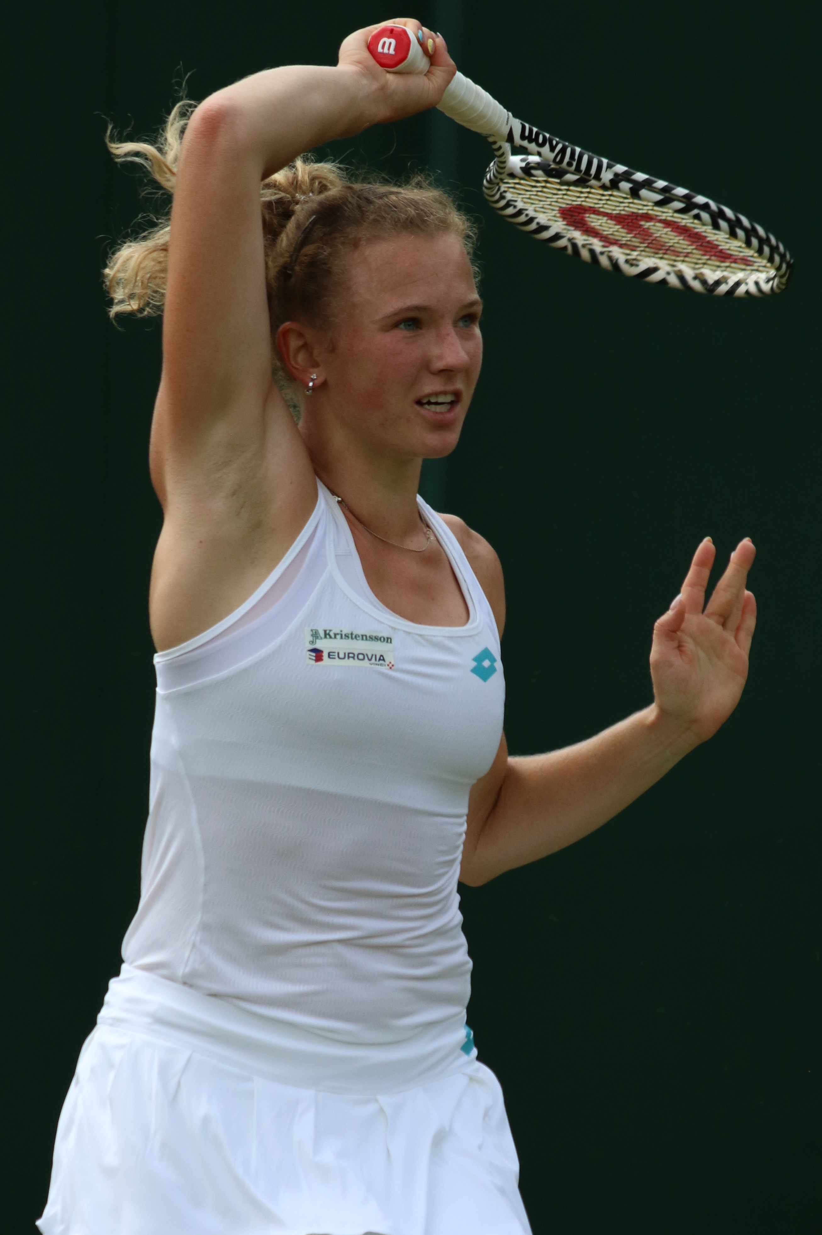 Siniakova WM19 (8)